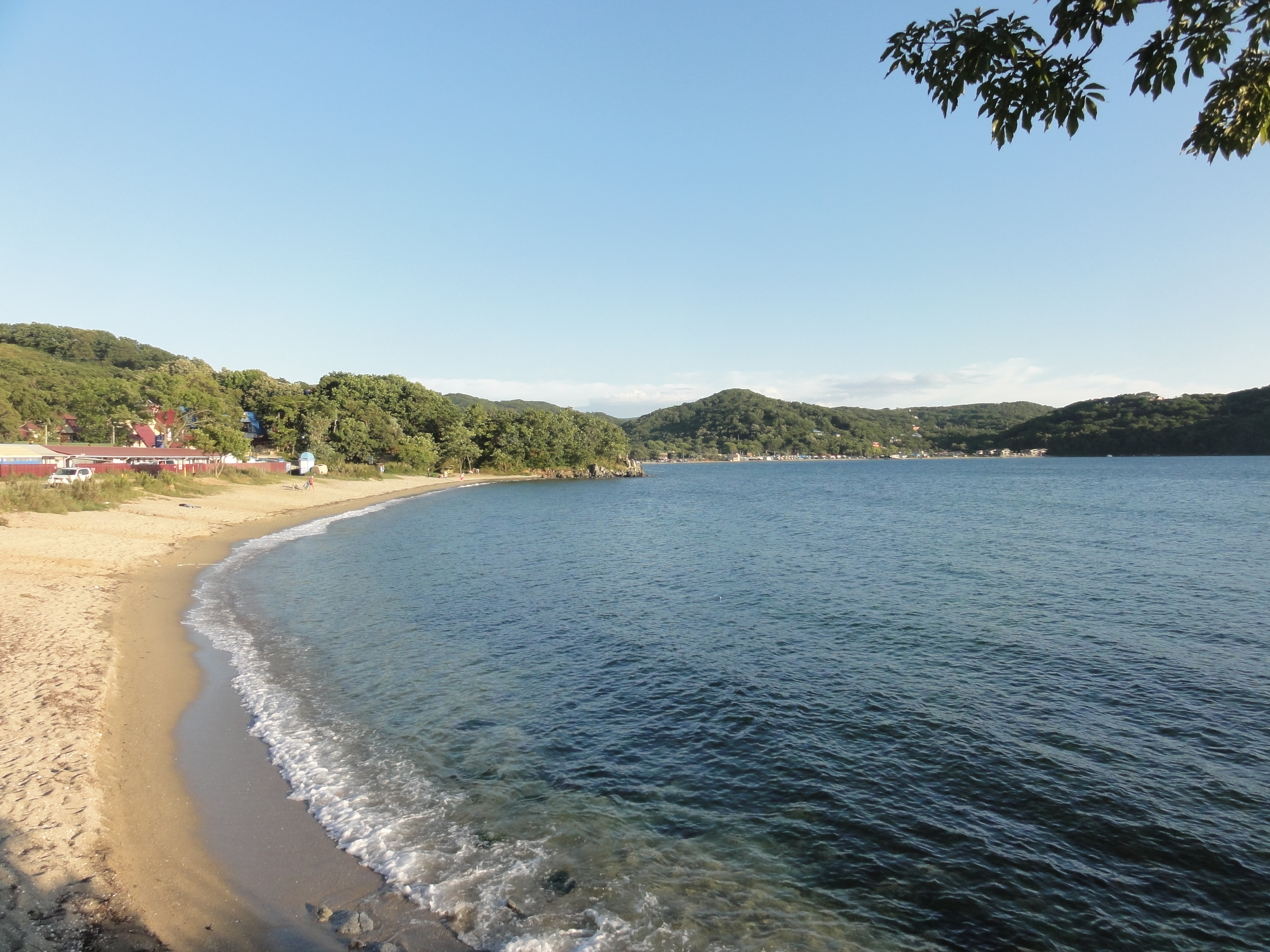 Пляжи и турбазы на восточном побережье бухты Троицы